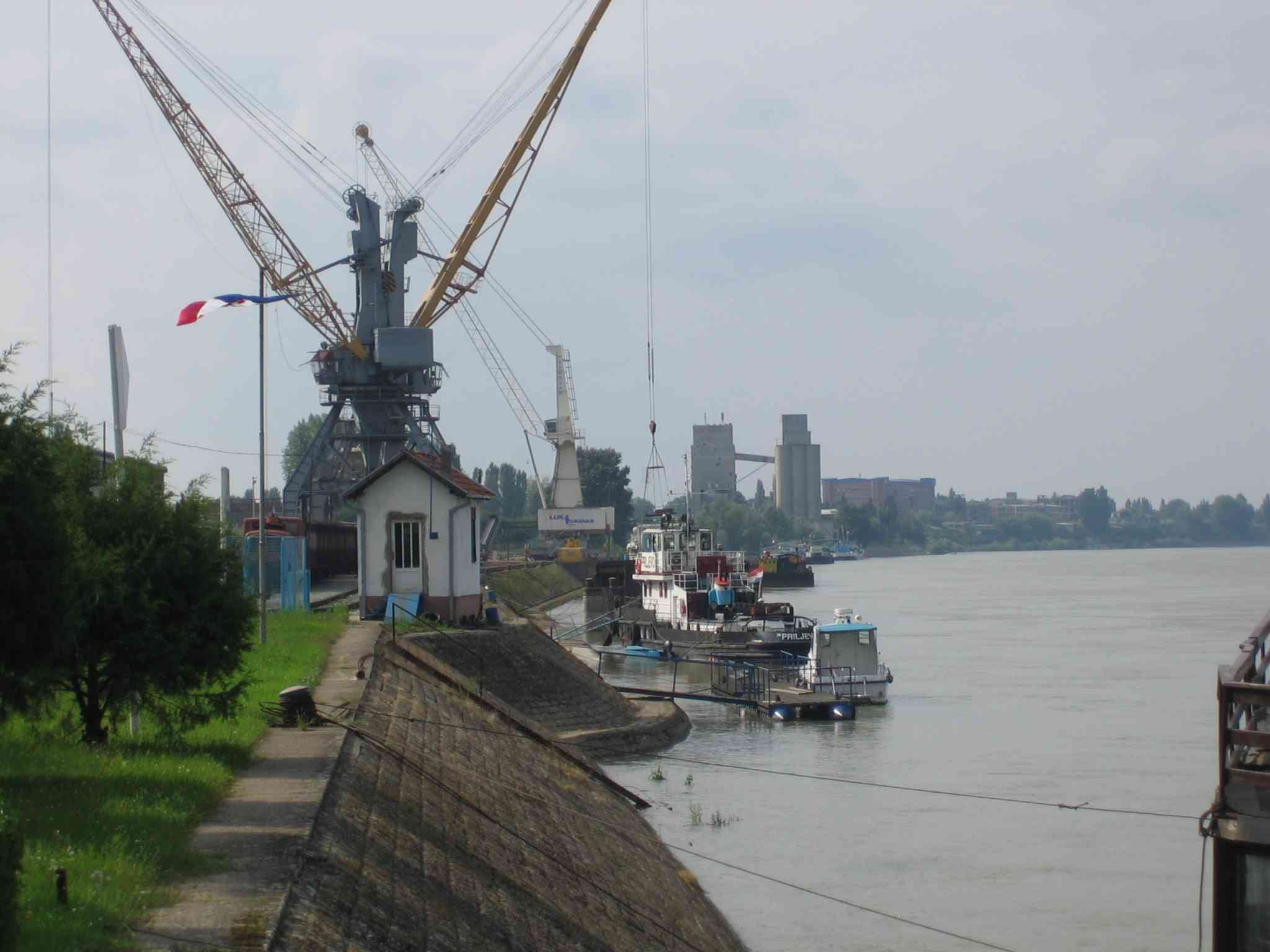 selbst erstellt